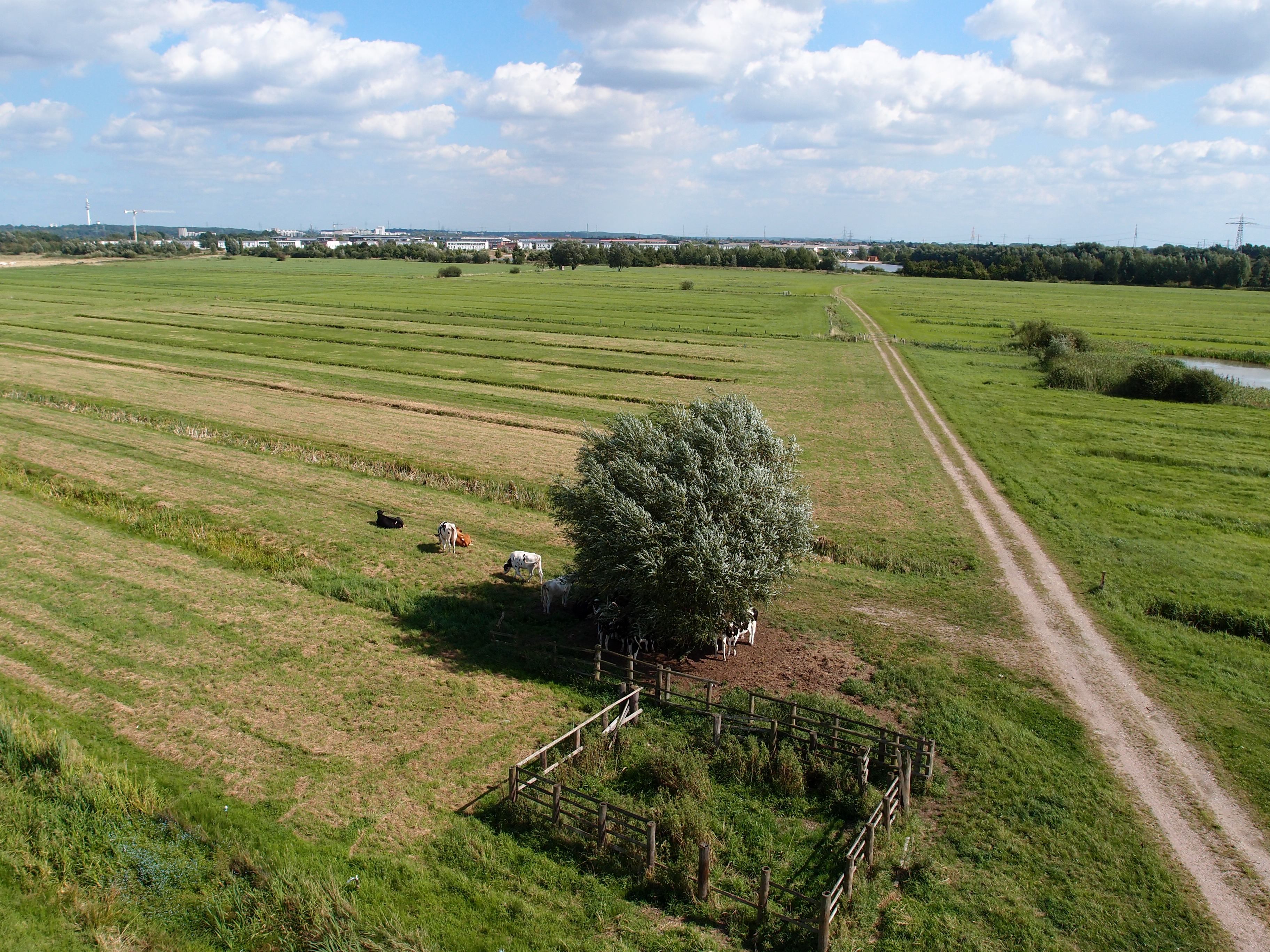 Allermöher Marsch (Blickrichtung Osten)